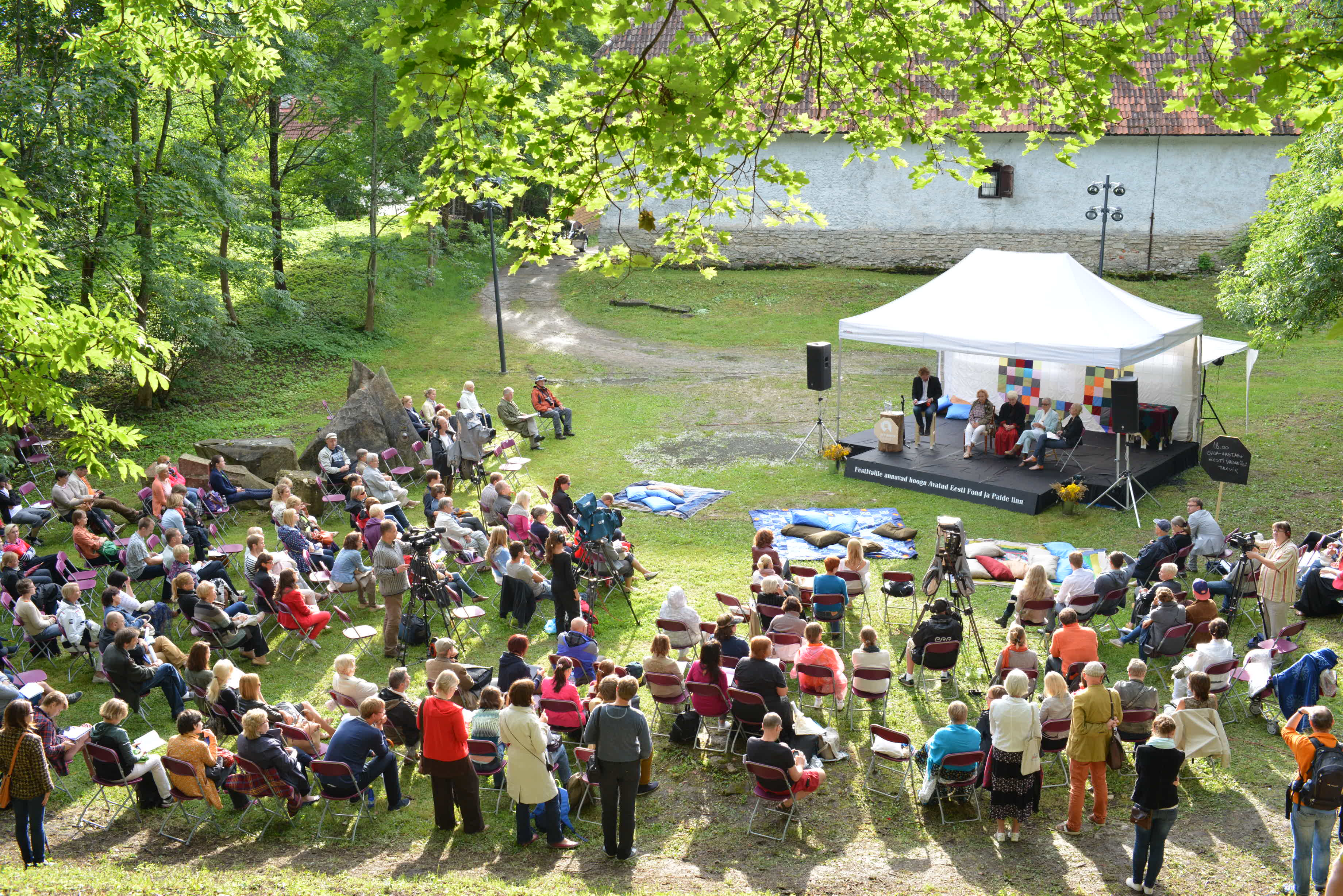 Arvamusfestival 2014: "Saja-aastase Eesti Vabariigi tulevik"